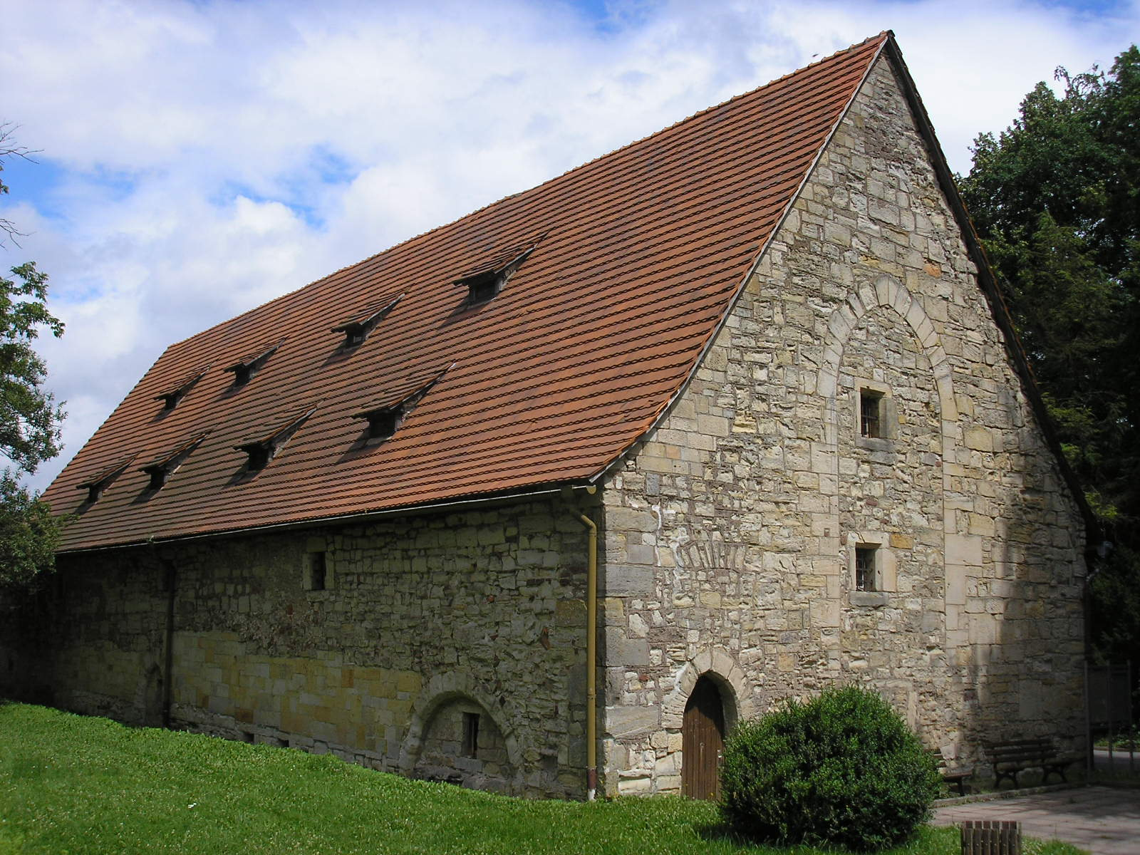 Das Kornhaus des Klosters in Georgenthal (Thüringen).